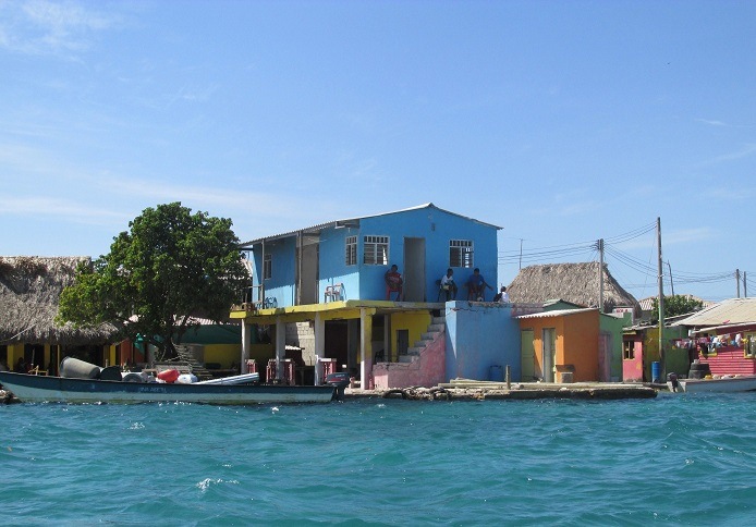 Santa Cruz del Islote en el Golfo de Morrosquillo, Colombia.